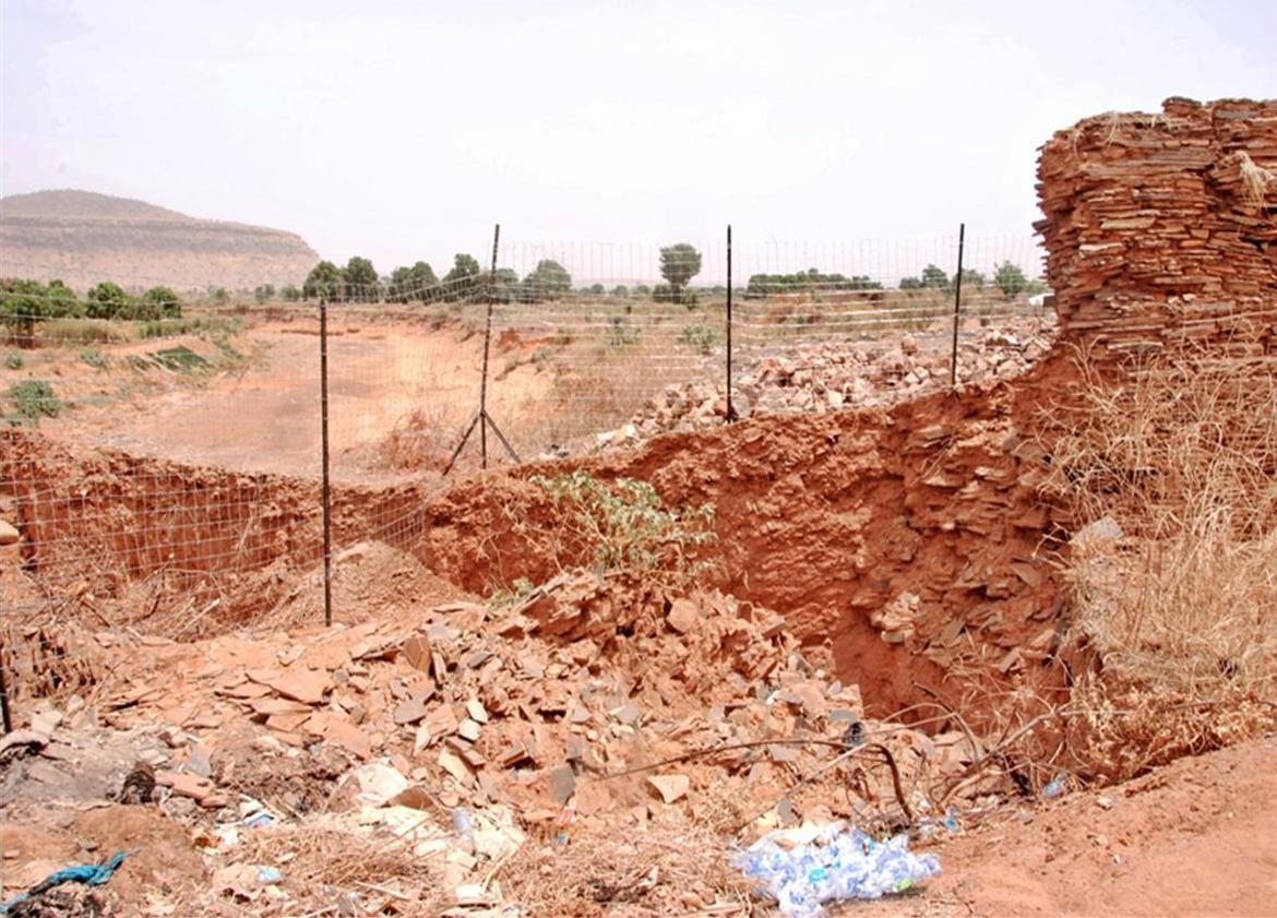 concours wikichallenge écoles d'afrique 2019